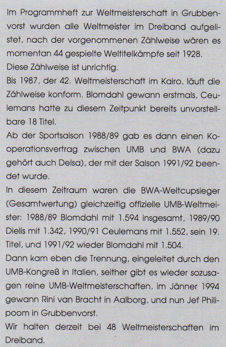 Klärungsdarstellung des Vertragszustandes (1988–1991) zwischen der „Union Mondiale de Billard“ (UMB) und der „Billiards Worldcup Association“ (BWA)